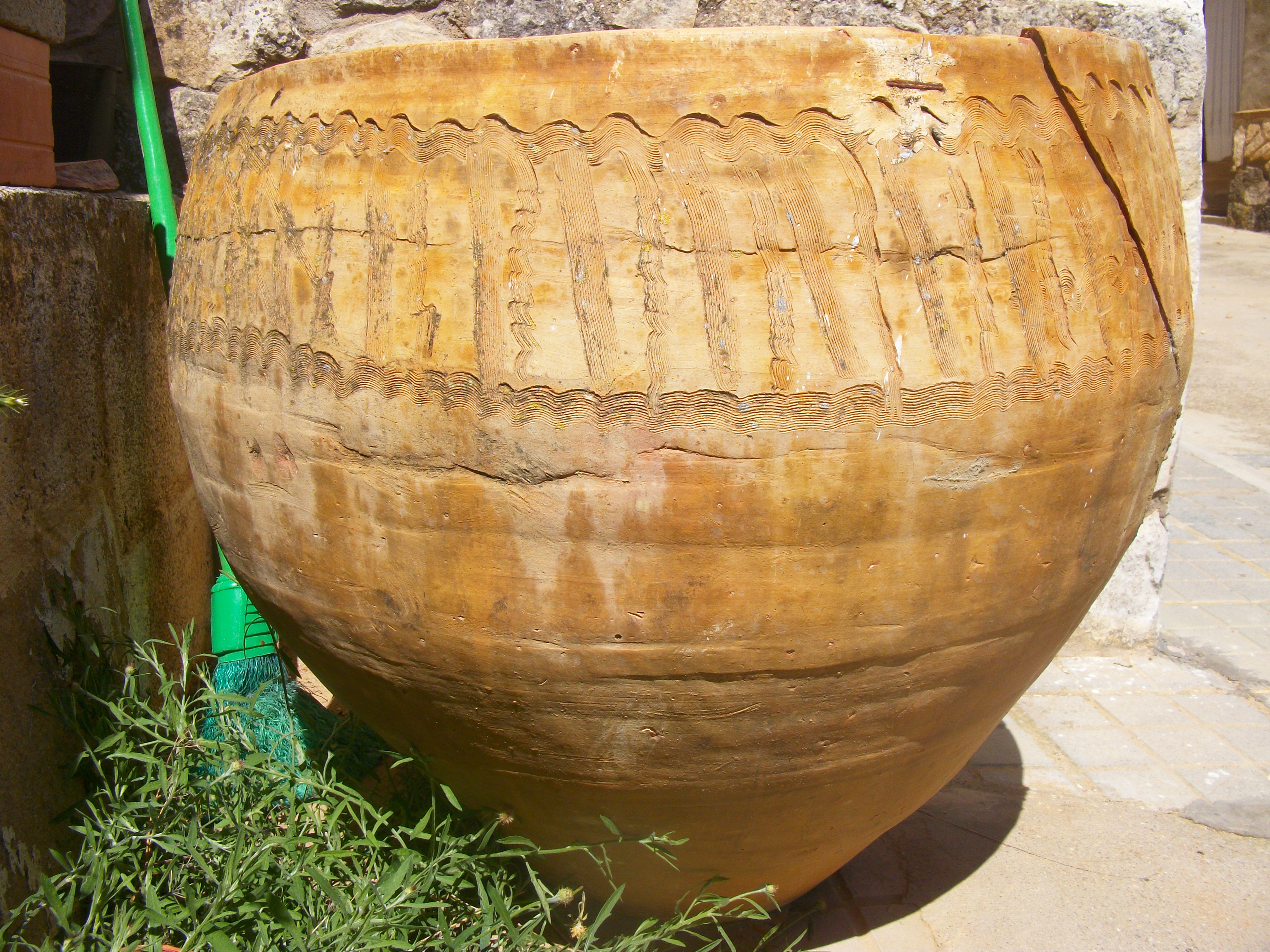 Cociol con decoración a peine. Alfarería de Ademuz.